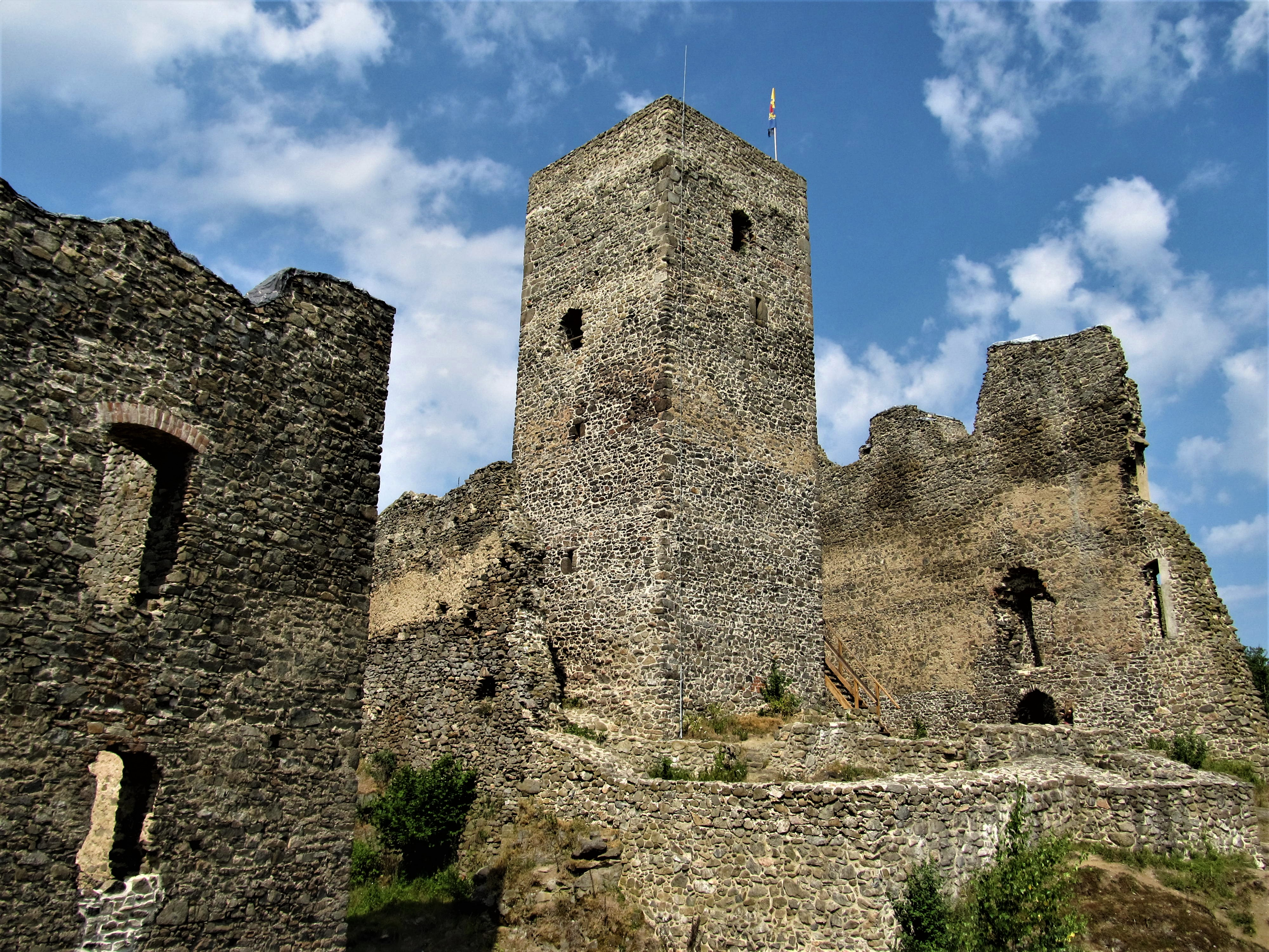 Zřícenina hradu Rokštejn